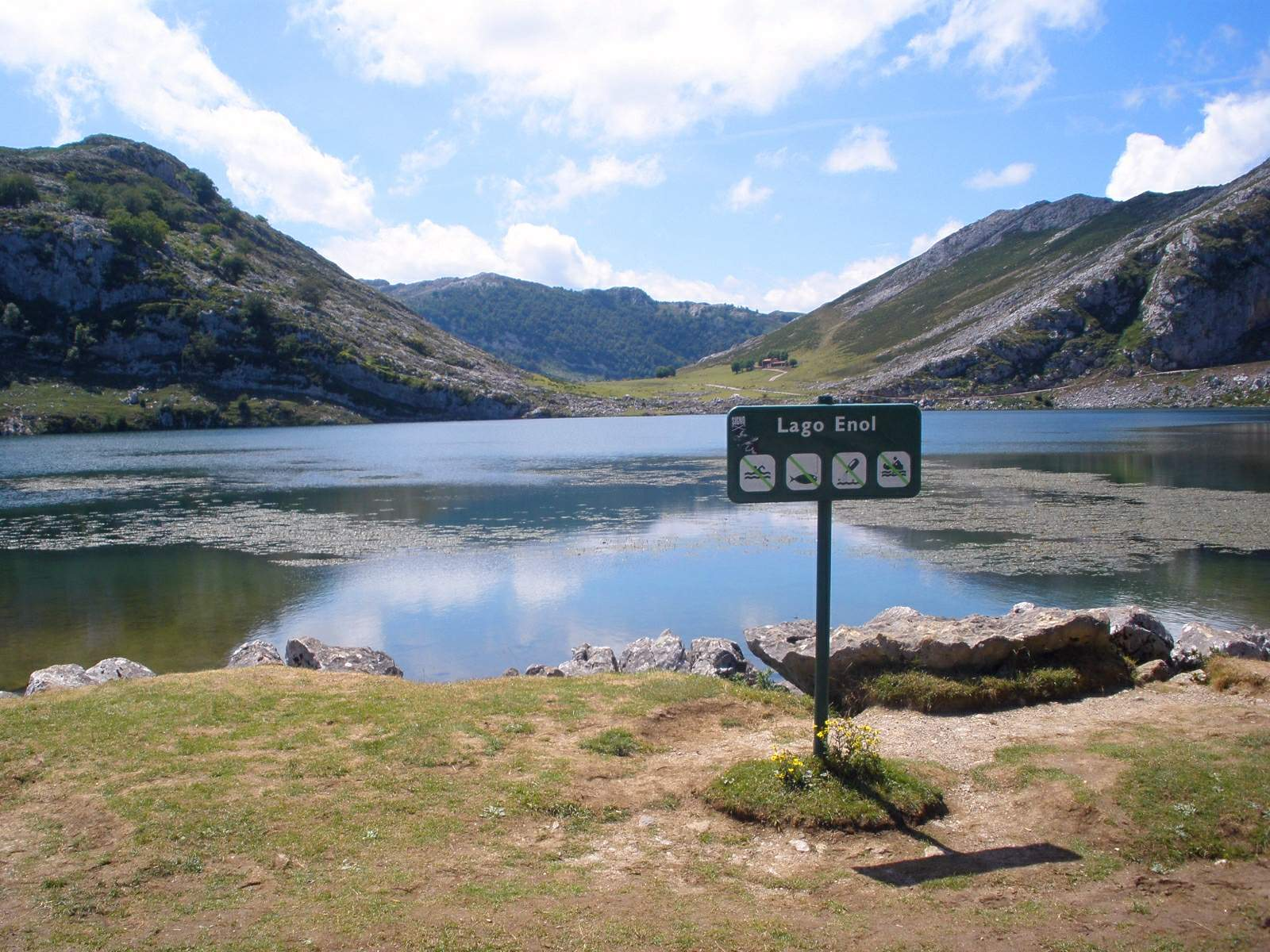 Lago Enol (Covadonga, Asturias)